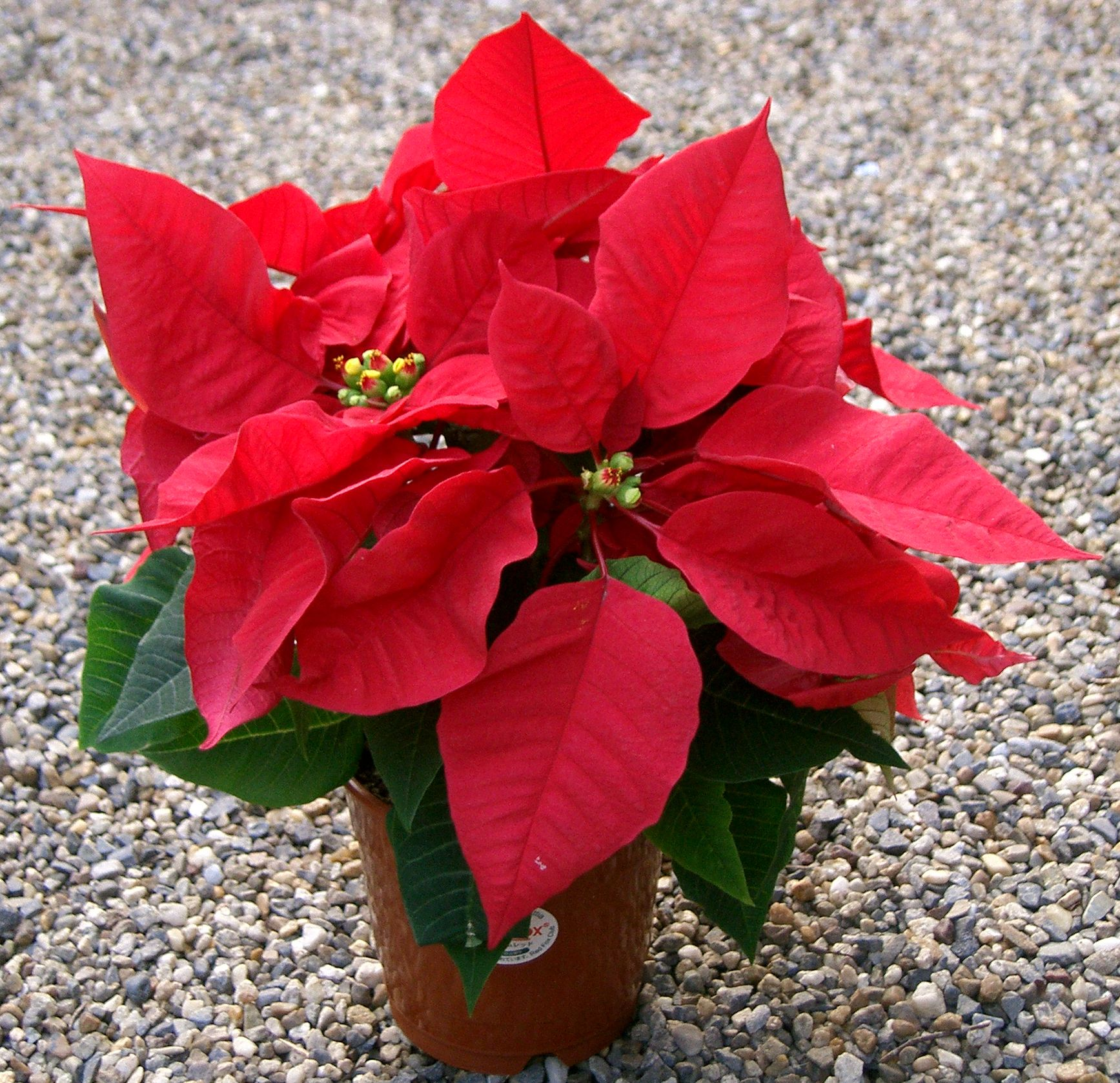 Euphorbia pulcherrima cv. RedFox